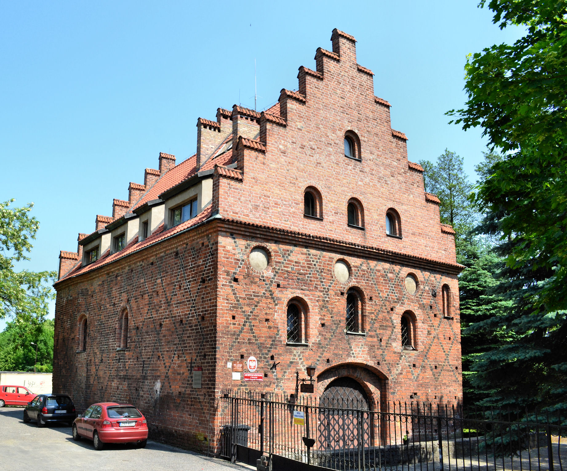 Arsenał w Stargardzie Szczecińskim